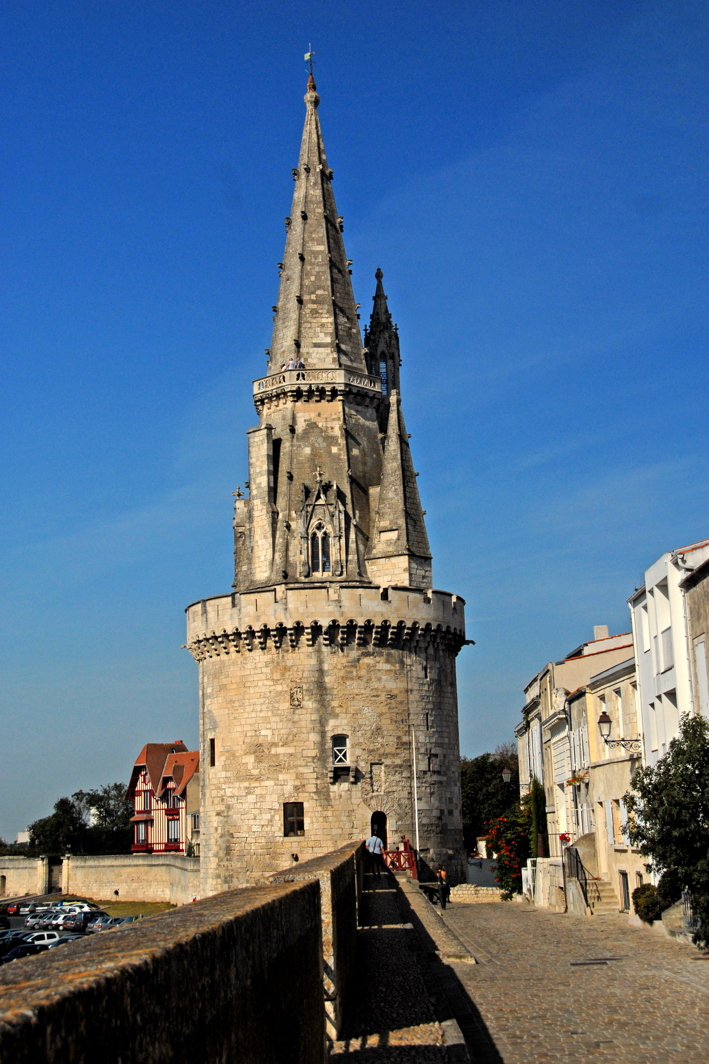 La Rochelle, Tour de la Lanterne, vom Wehrgang aus